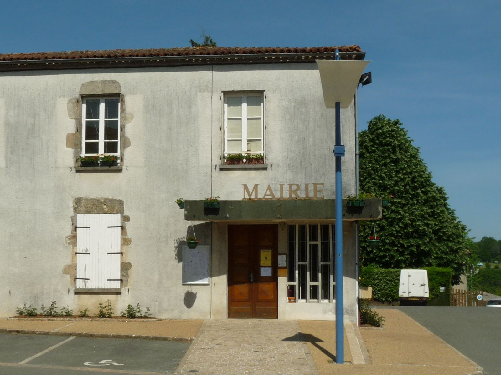 mairie de Massignac, Charente, France